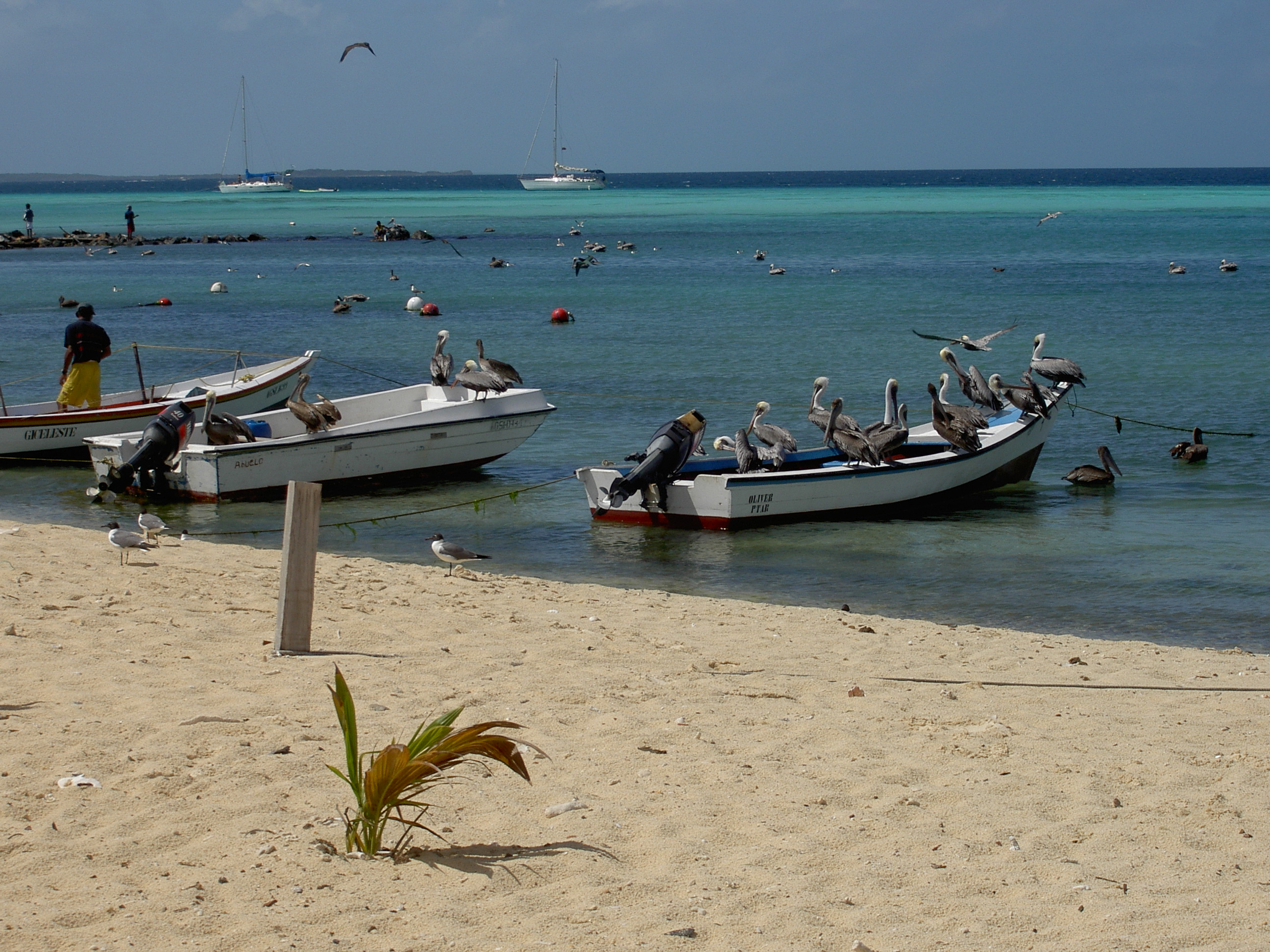 Foto tomada en la Playa del Gran Roque. Los pelícanos usan los peñeros para descansar. Autor: Pedro Sánchez (PSE)